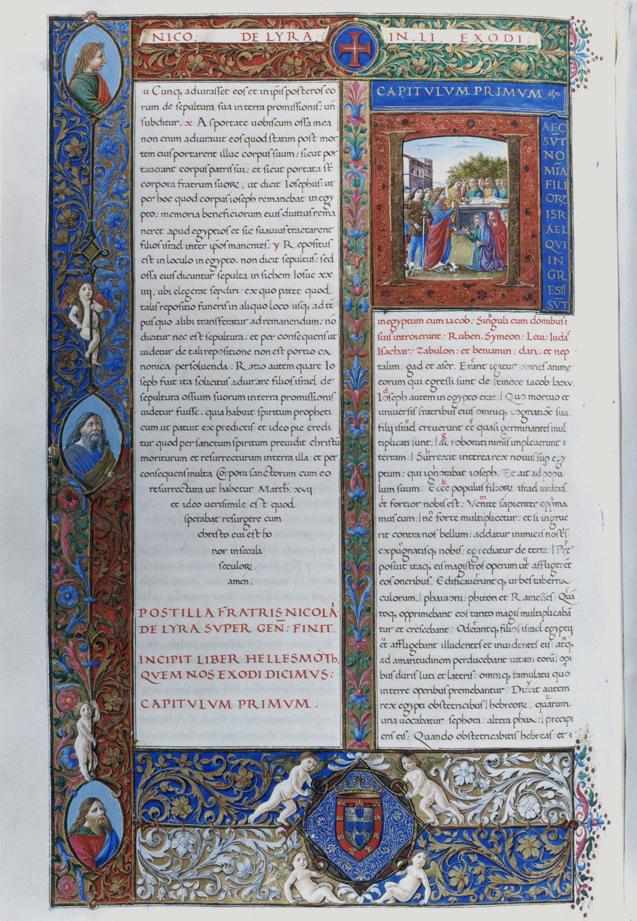 Bíblia dos Jerónimos, página do Vol. I